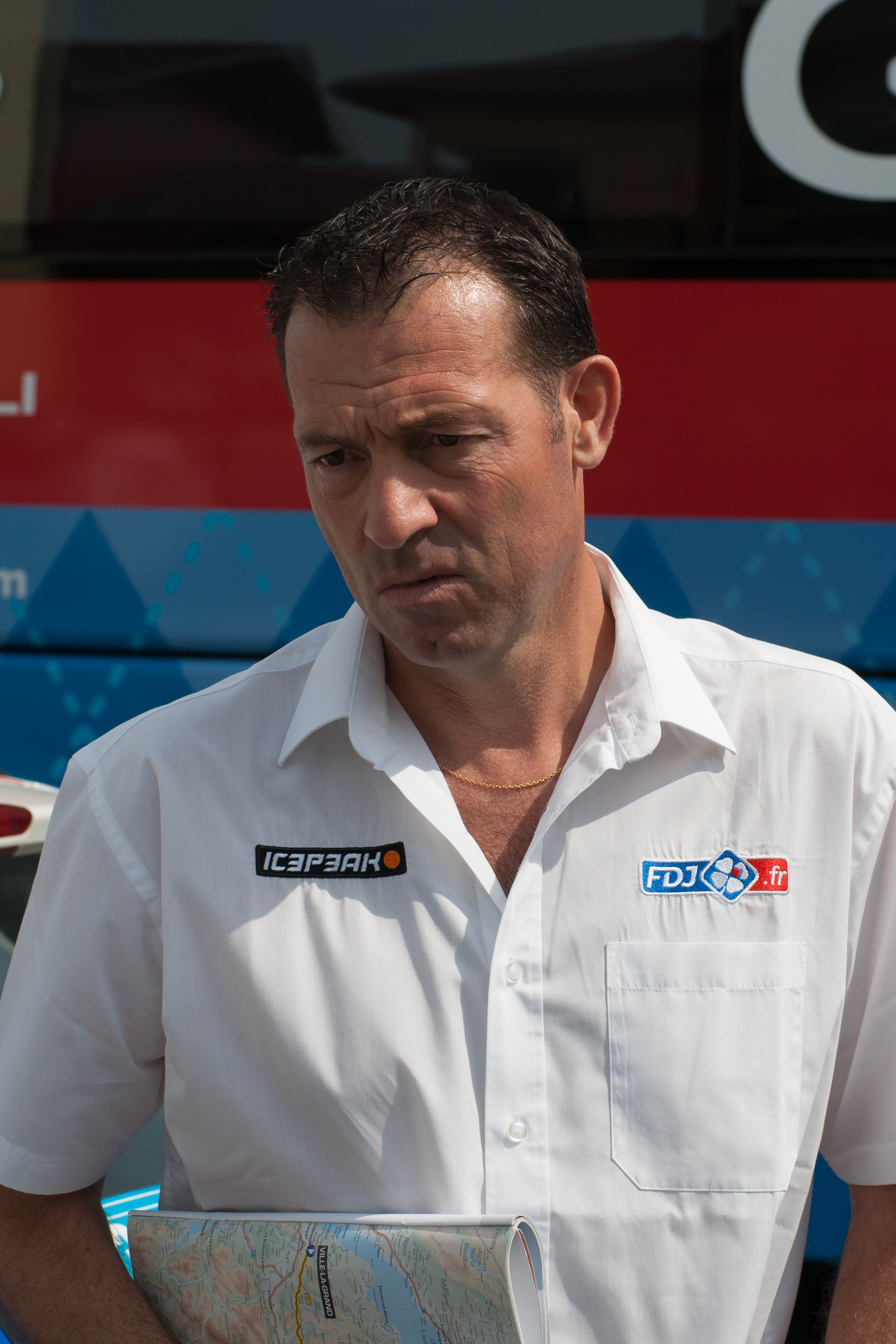 Critérium du Dauphiné 2014 - Etape 7 - Thierry Bricaud